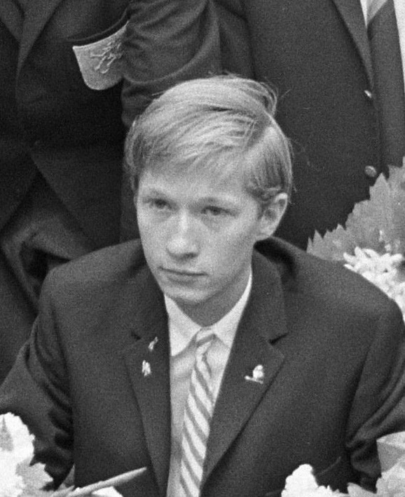 Aankomst van de Nederlandse roeiers op Schiphol na afloop van het wereldkampioenschap roeien te Bled in het voormalig Joegoslavië. De Haan